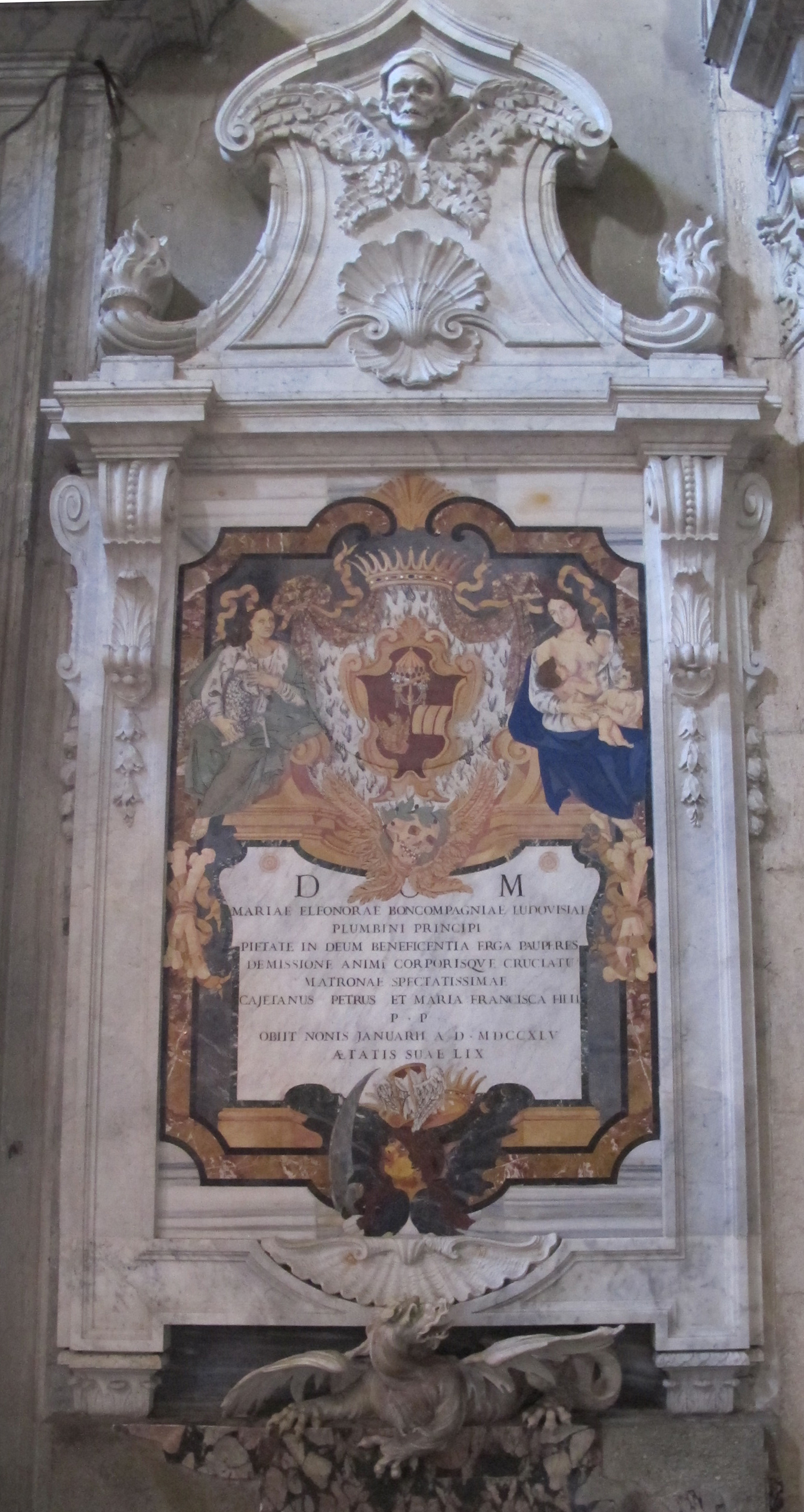 Santa maria del popolo, monum a maria eleonora boncompagni ludovisi